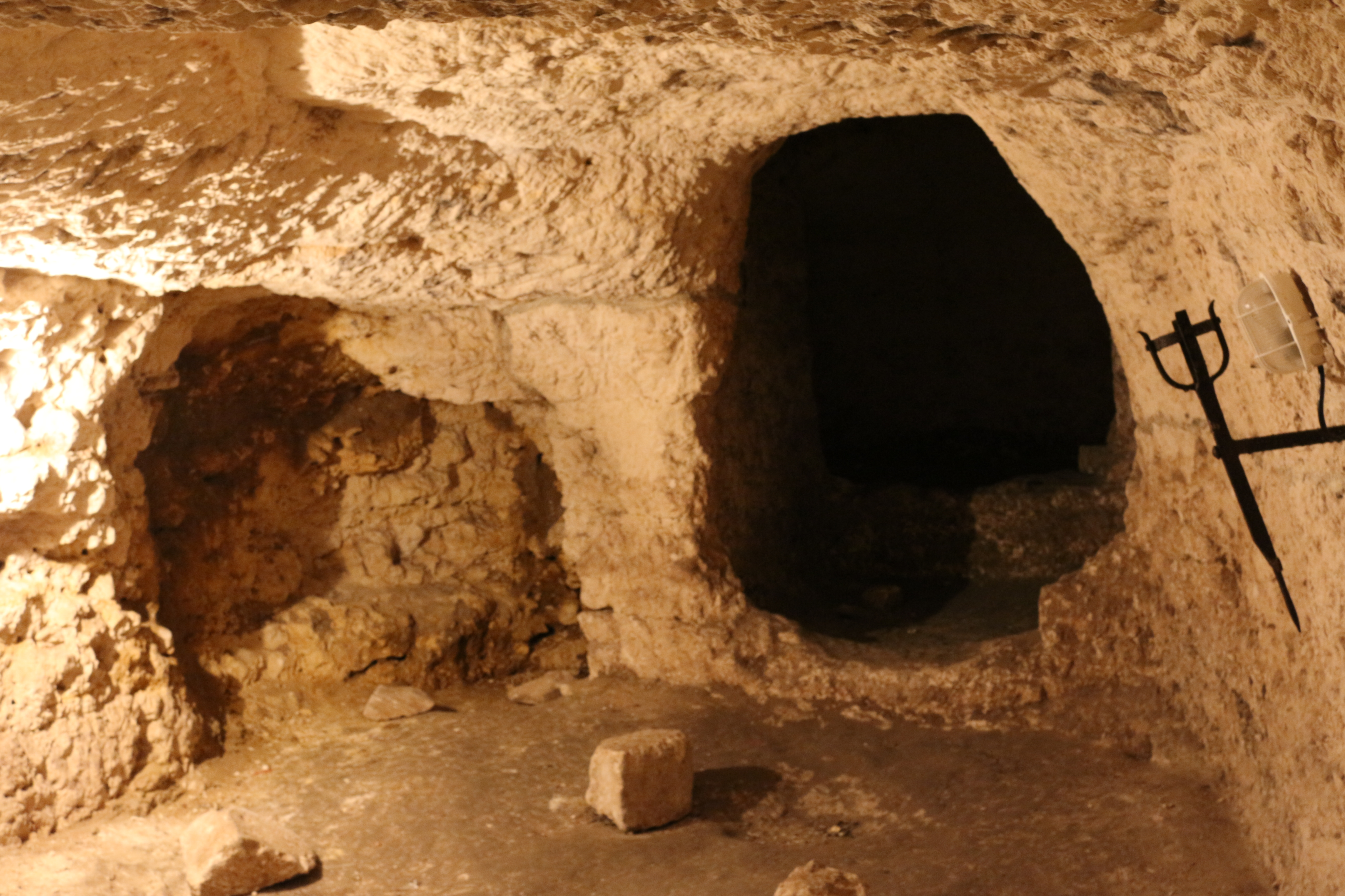 La crypte sous l'église Saint-Martin à Meursac, Charente-Maritime, Poitou-Charentes, France. Au fond dans la pénombre, la chapelle couverte d'un dôme. .